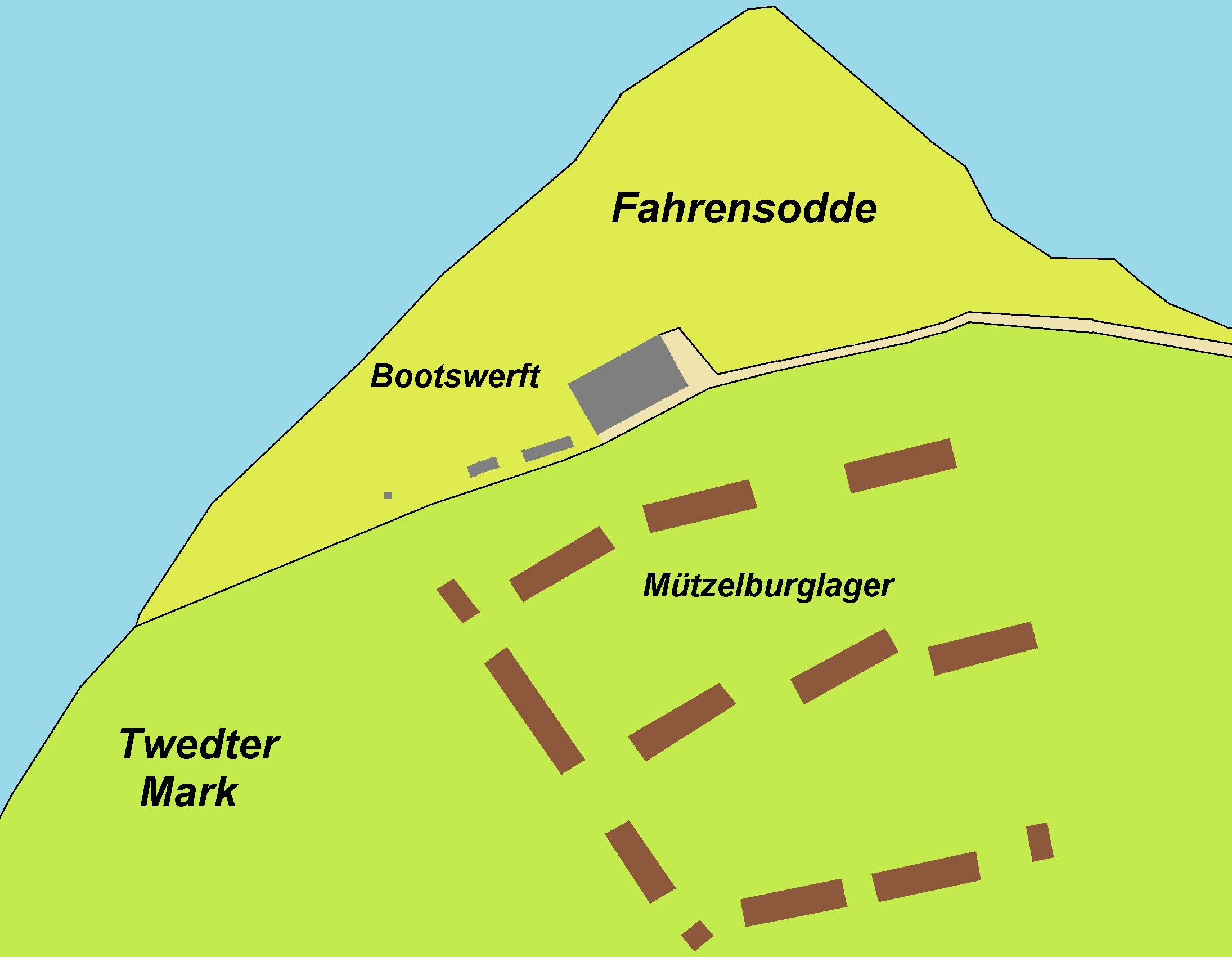 Kartenskizze vom Mützelburglager mit Blick auf die Karte StaFl XIV K/P 2963ff im Stadtarchiv erstellt mit leichtem Blick auf aktuelle Situation dort hinsichtlich Vervollständigung der Küstenlinie usw.